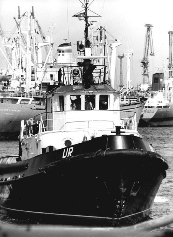 Rostock, Überseehafen, Schlepper ADN-ZB Sindermann 12.1.1979 Zum Beitrag: Mit "Ur"-Kraft Hafenbetrieb garantiert - Nächtlicher Eisaufbruch auf Rostocker Seewasserstraßen Der Schlepper "Ur", ein in der UdSSR gebautes starkes Spezialfahrzeug wird gegenwärtig wie viele seiner "Brüder" zum Eisaufbruch im Seewasserstraßengebiet des Rostocker Überseehafens eingesetzt (Archivfoto) (Bitte beachten Sie hierzu auch U0112-303N und P1231-8N)